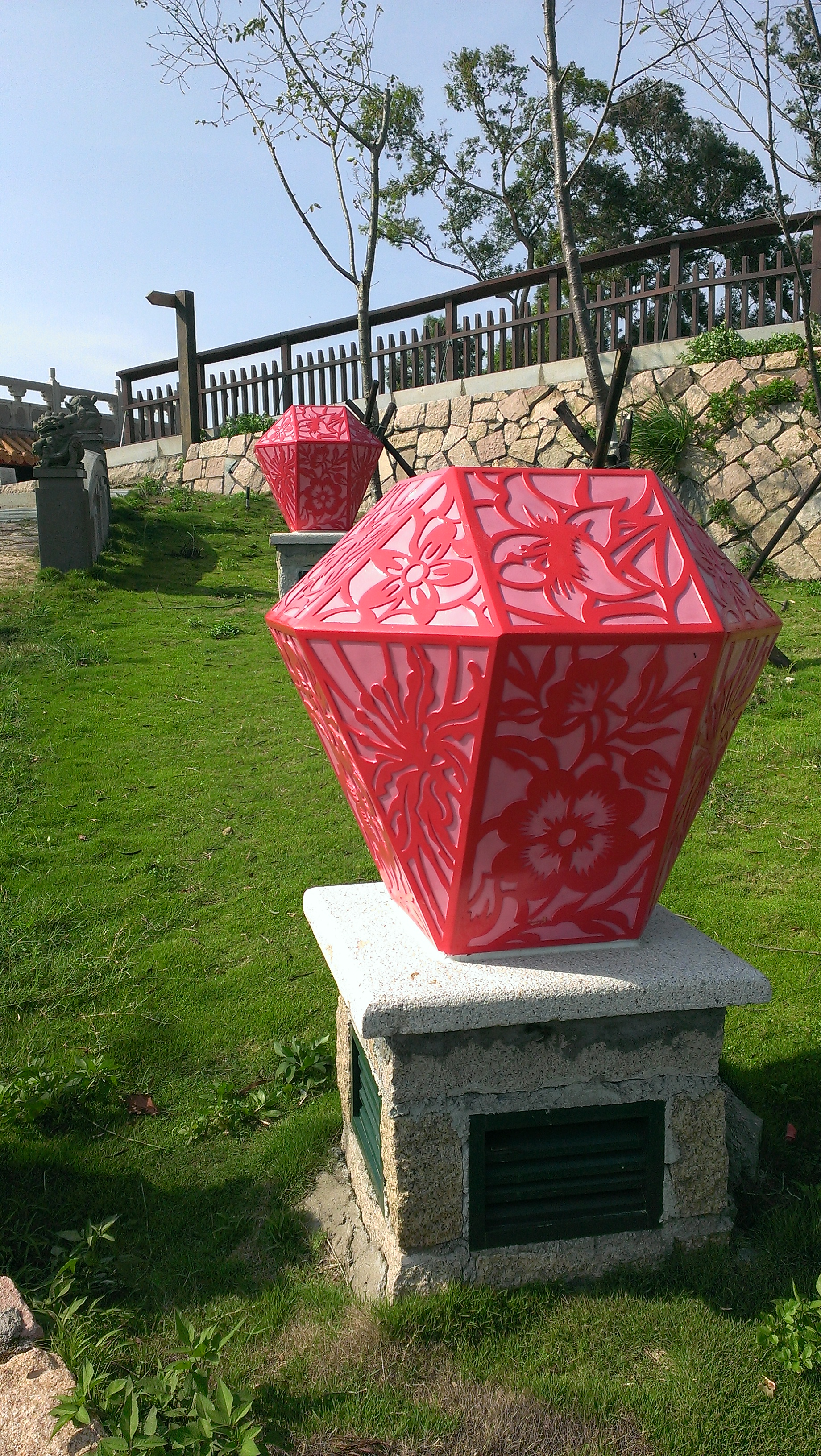 馬祖南竿鄉媽祖宗教園區所設風燈型照明燈